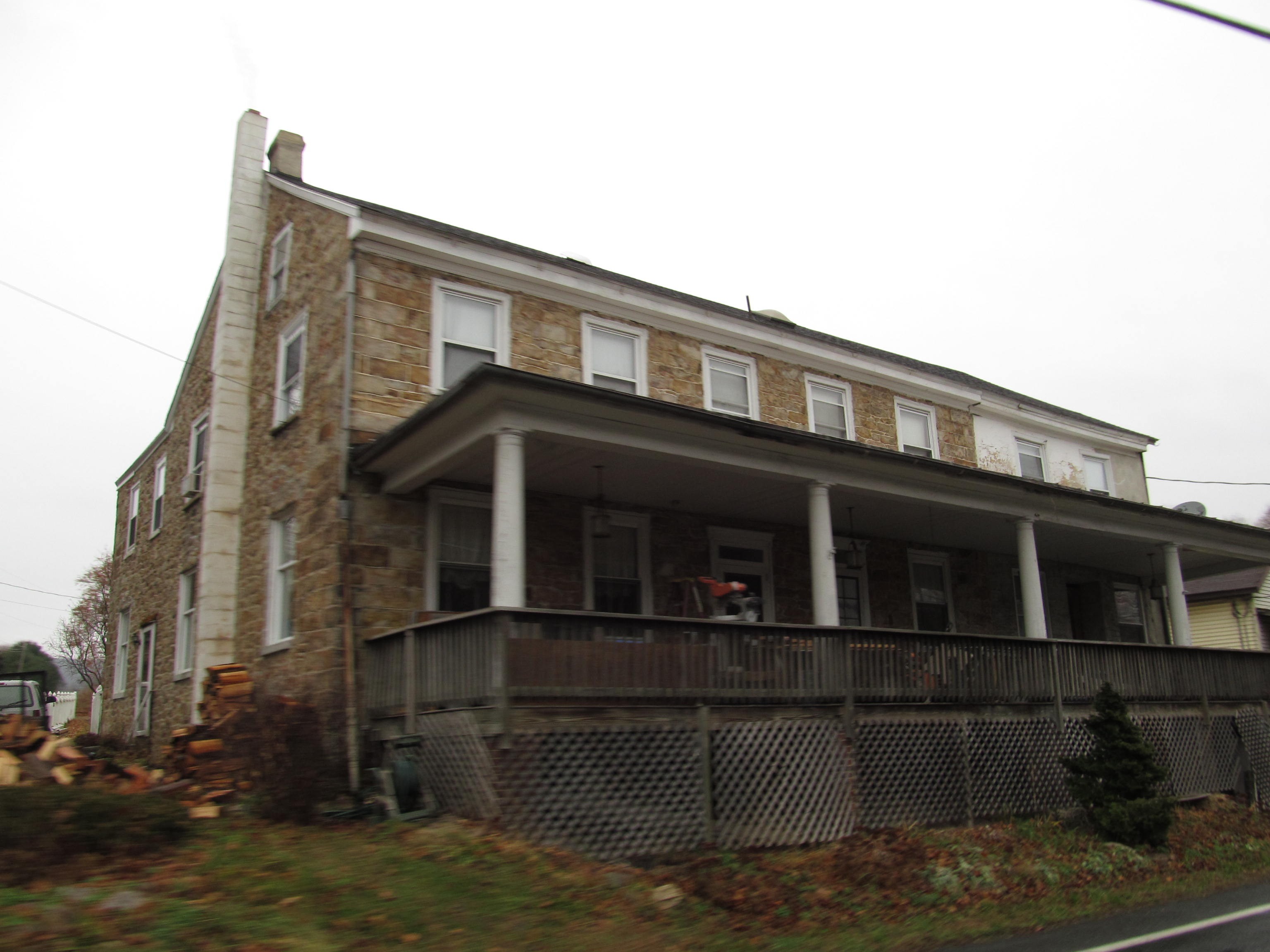 Lynnport, Pennsylvania